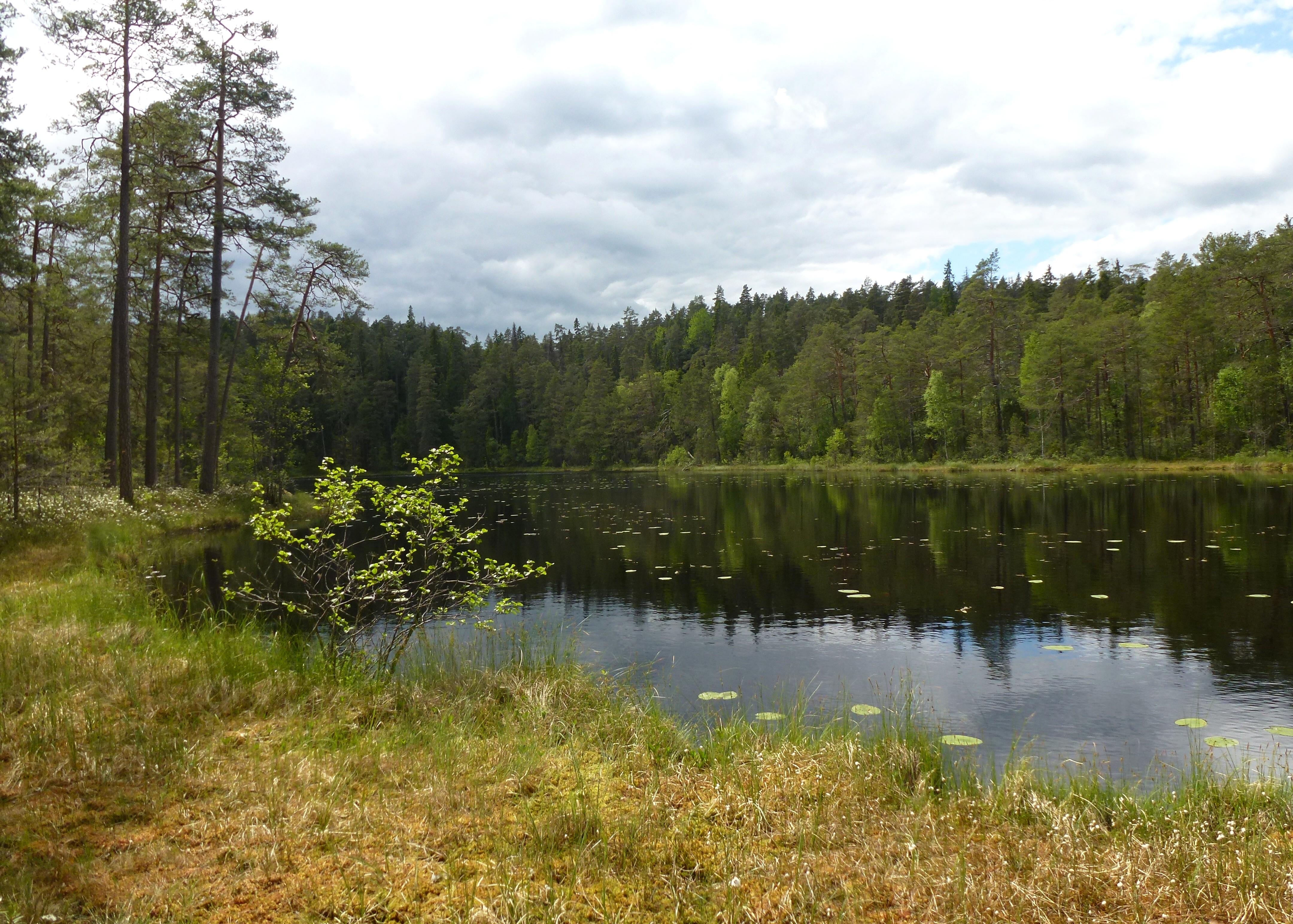 Norra Kvills nationalpark, Stora Idgölen